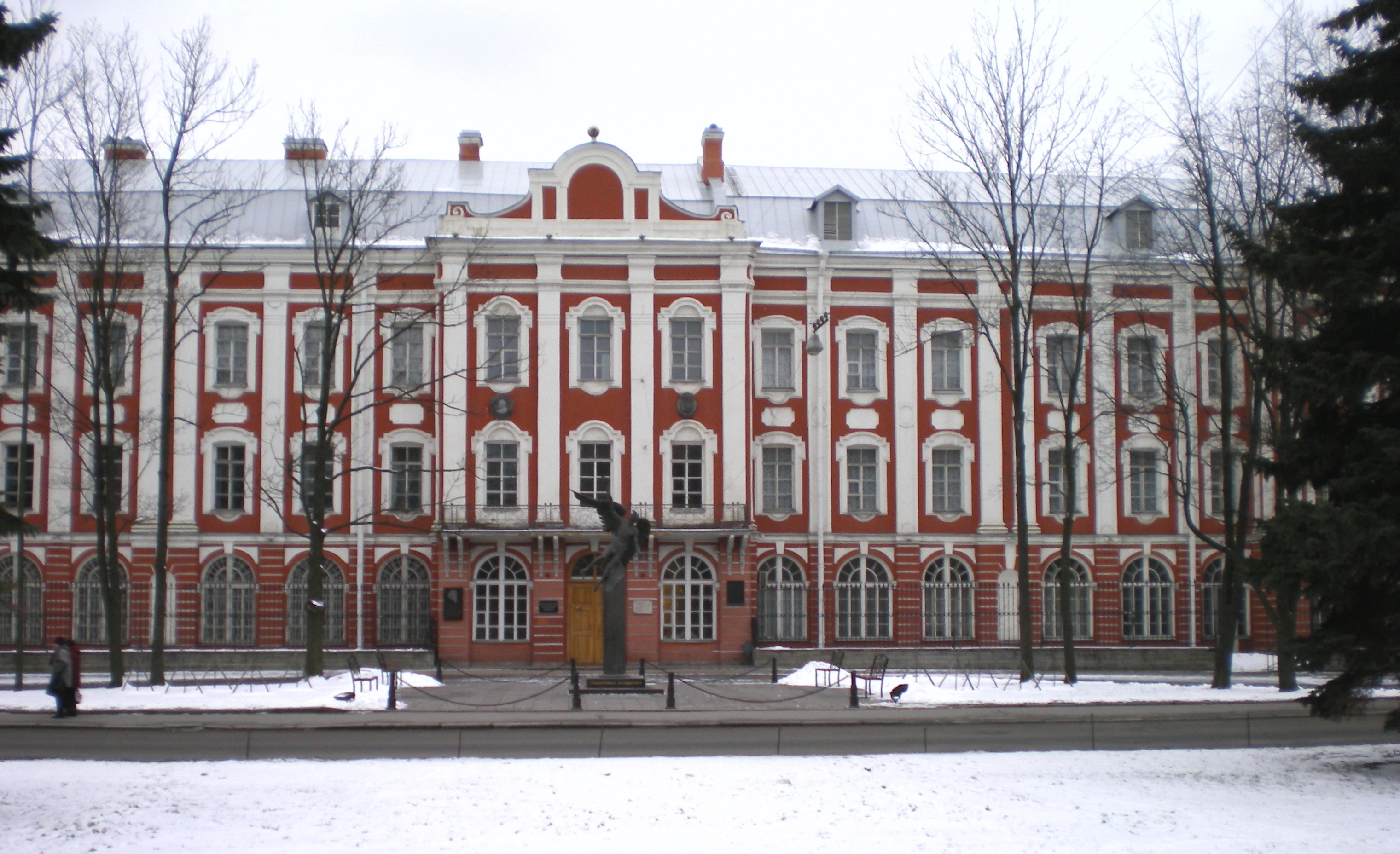 12 коллегий. Главный вход в университет. Памятник «Универсанту-Гению»